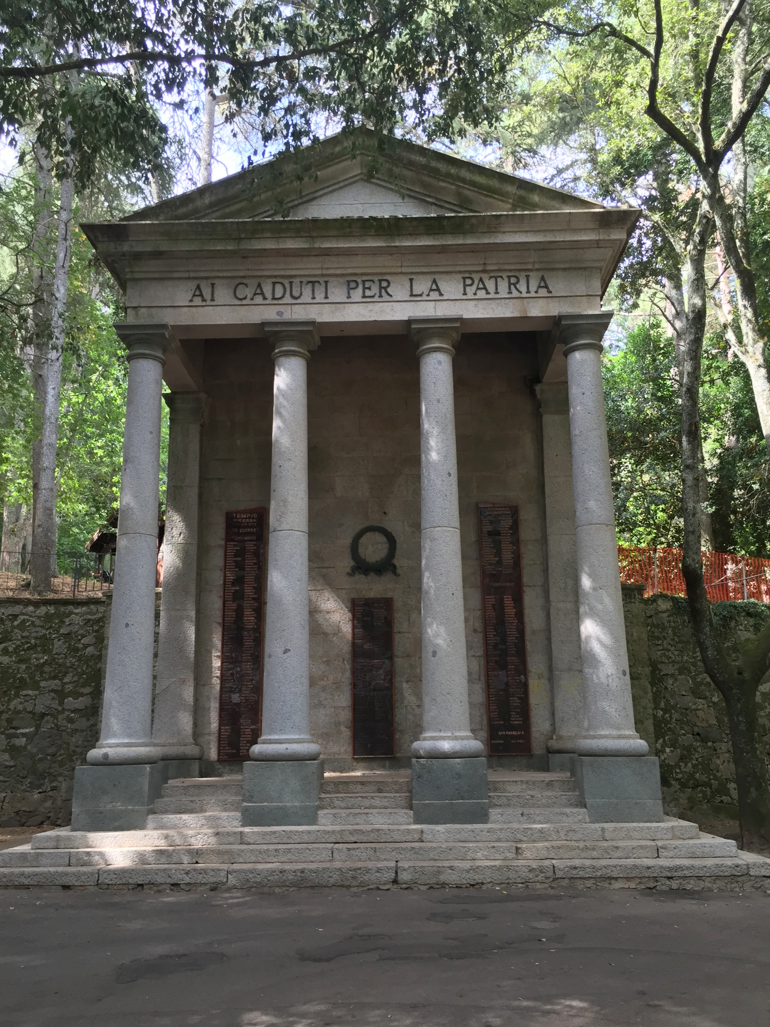 Gallura, 2016 (Sardaigne).